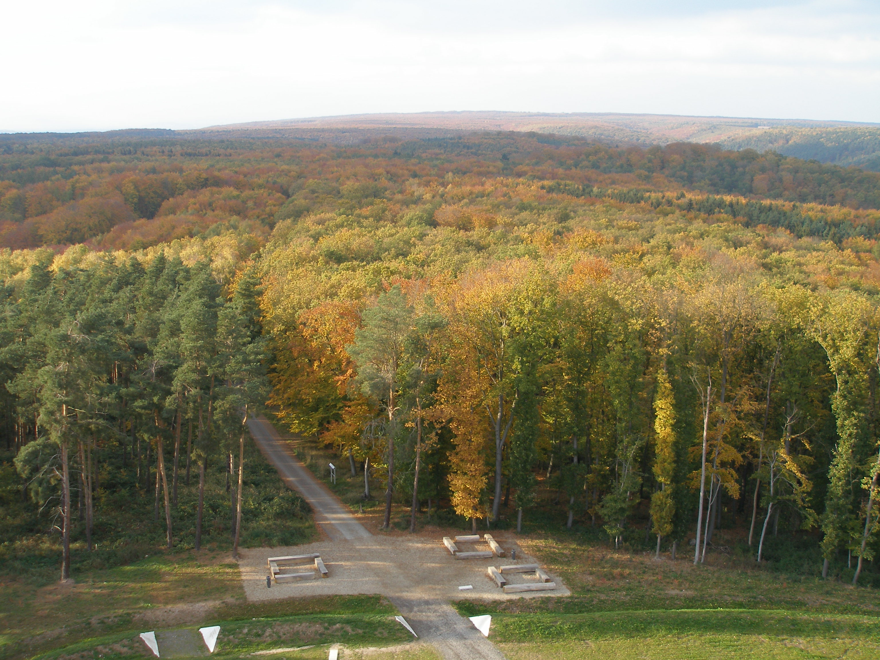 Blick vom Aussichtsturm auf dem Mittelberg über den Ziegelrodaer Forst in Richtung Ziegelroda